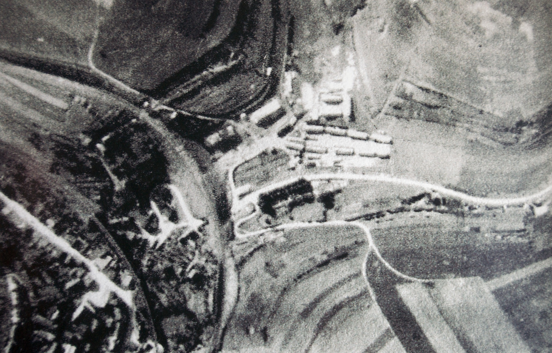 KZ-Niewelager aus der Loft.